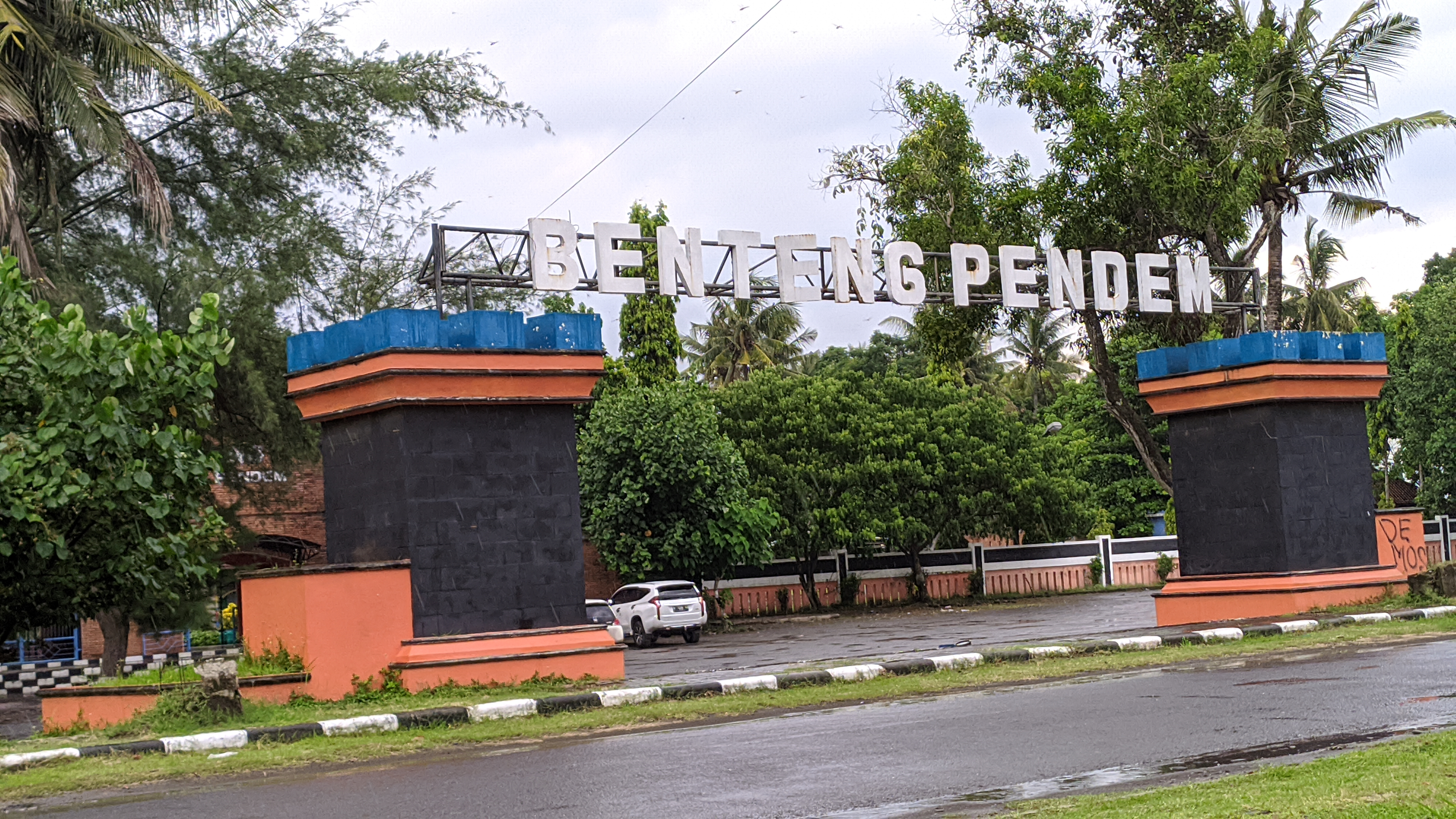 Pintu masuk parkiran benteng pendem